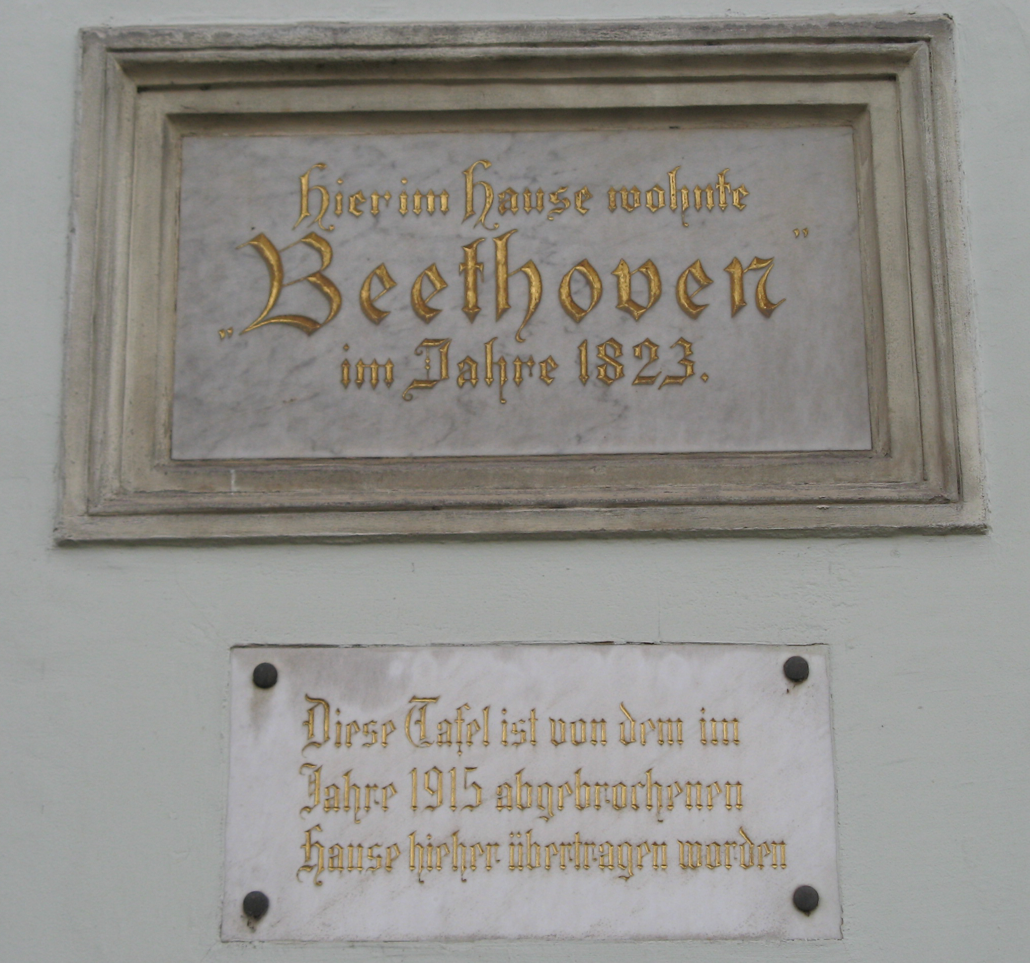 Gedenktafel für Ludwig van Beethoven am Haus Hetzendorfer Straße 75a in Wien-Meidling